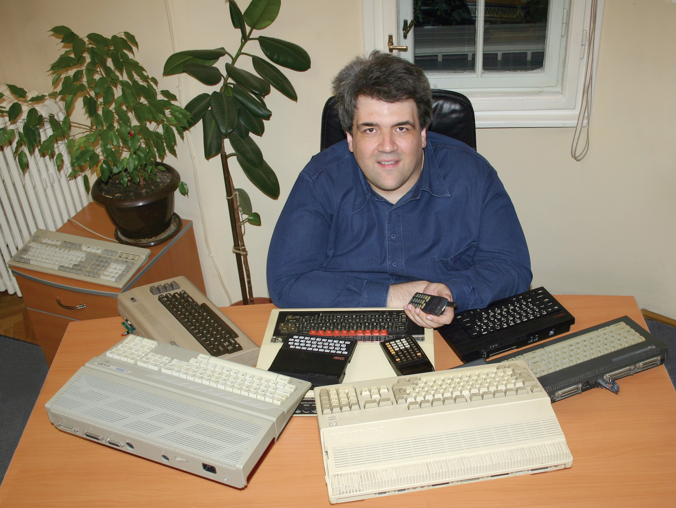 Dejan Ristanović